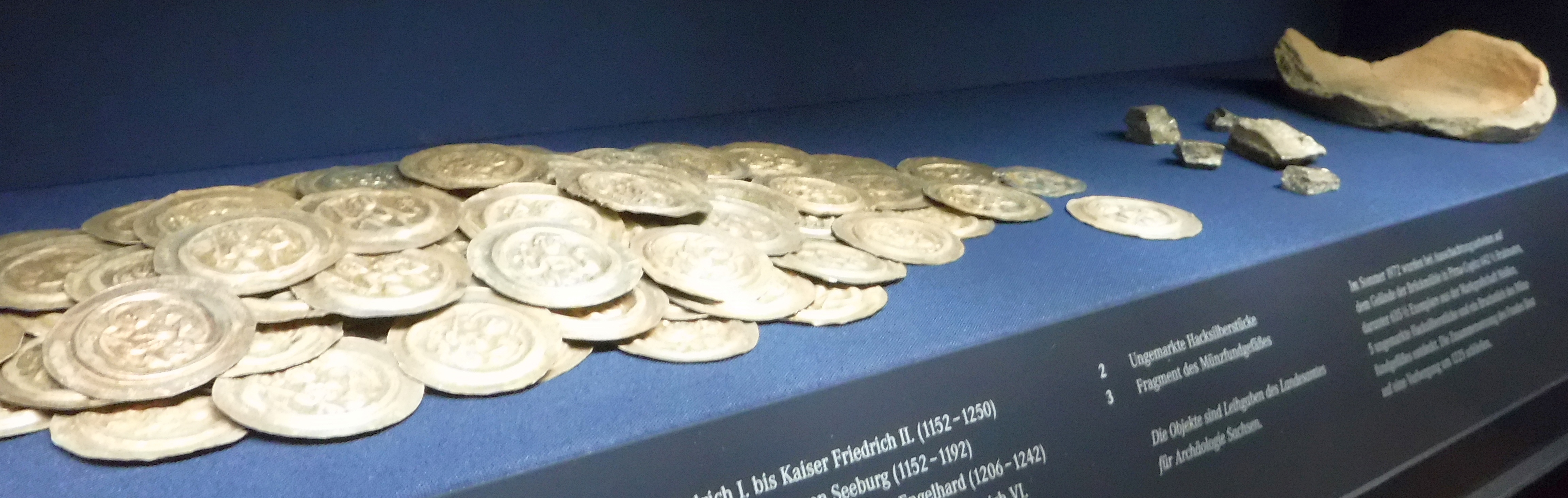 Münzfund aus dem Sommer 1972 nahe der Brückmühle in Pirna-Copitz: 642,5 Brakteaten, 5 Hacksilberstücke und das Bruchstück eines Münzgefäßes. Verbergung um 1225.